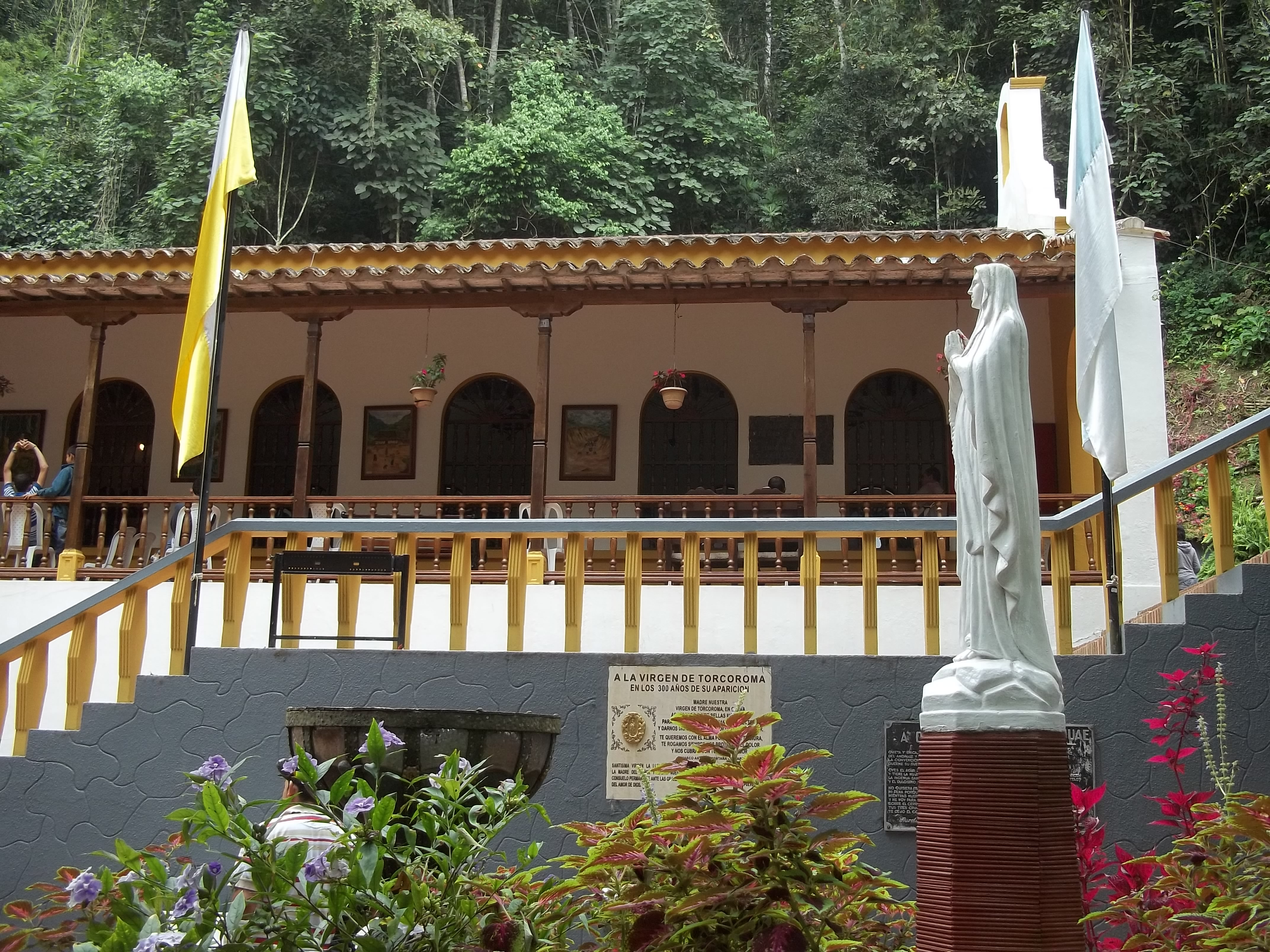 Iglesia e imagen del santuario de la virgen morena.